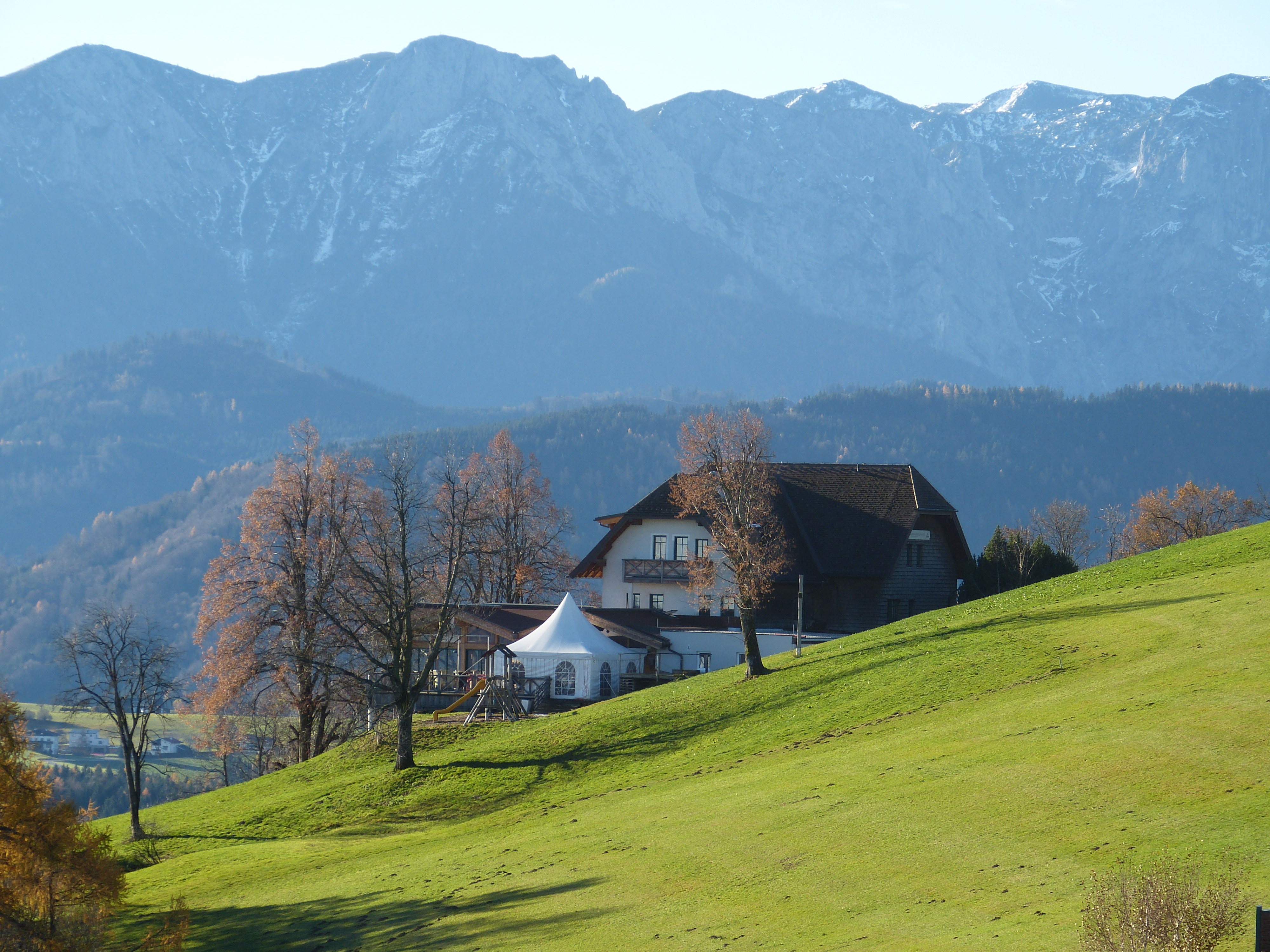 Altmünster ( Upper Austria ). Gmundnerberg inn.